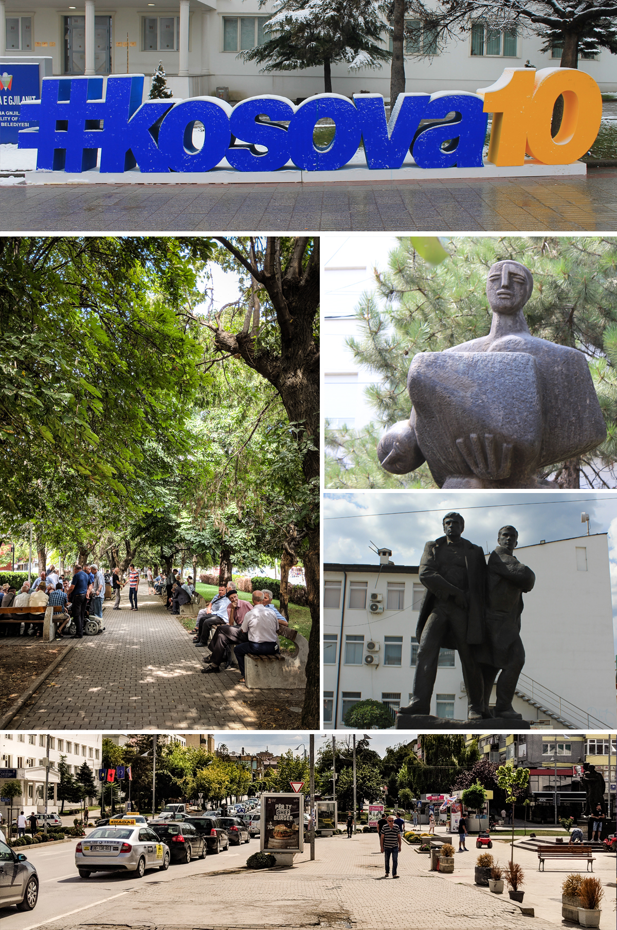 London